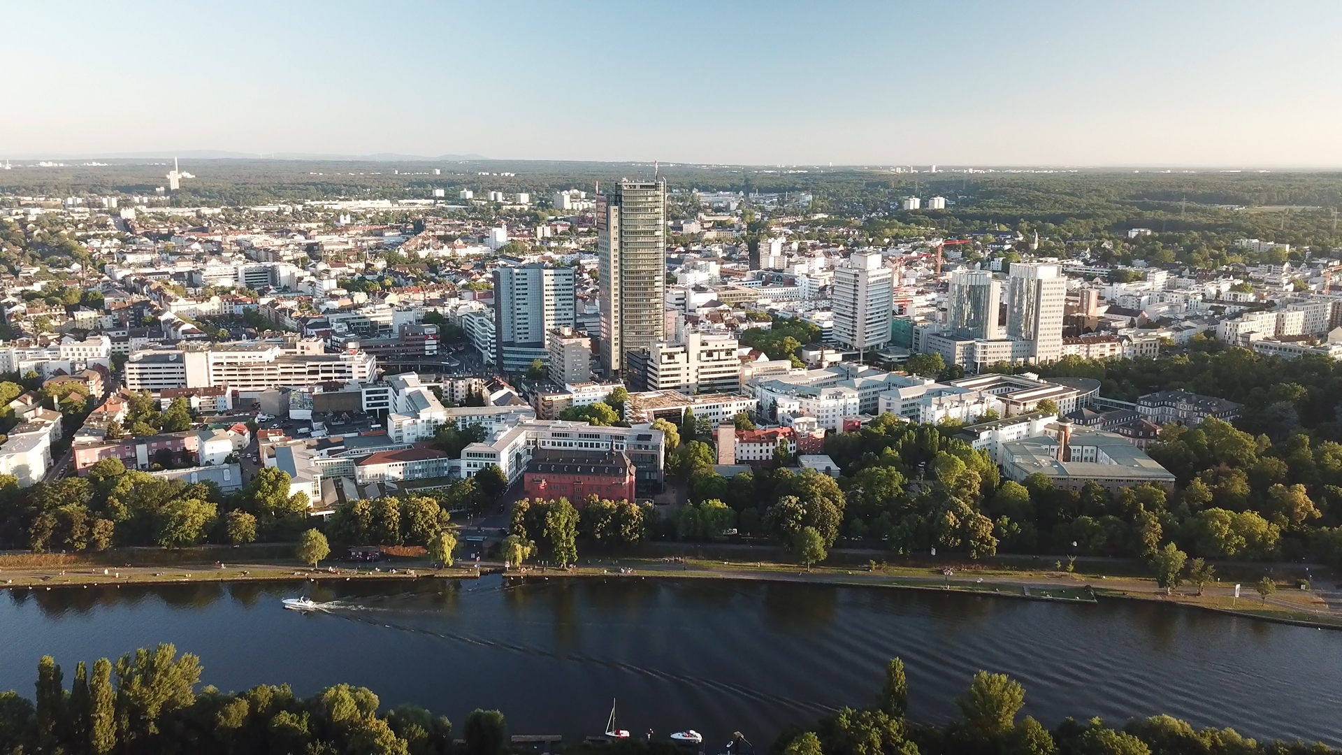 Offenbach am main von oben 2019